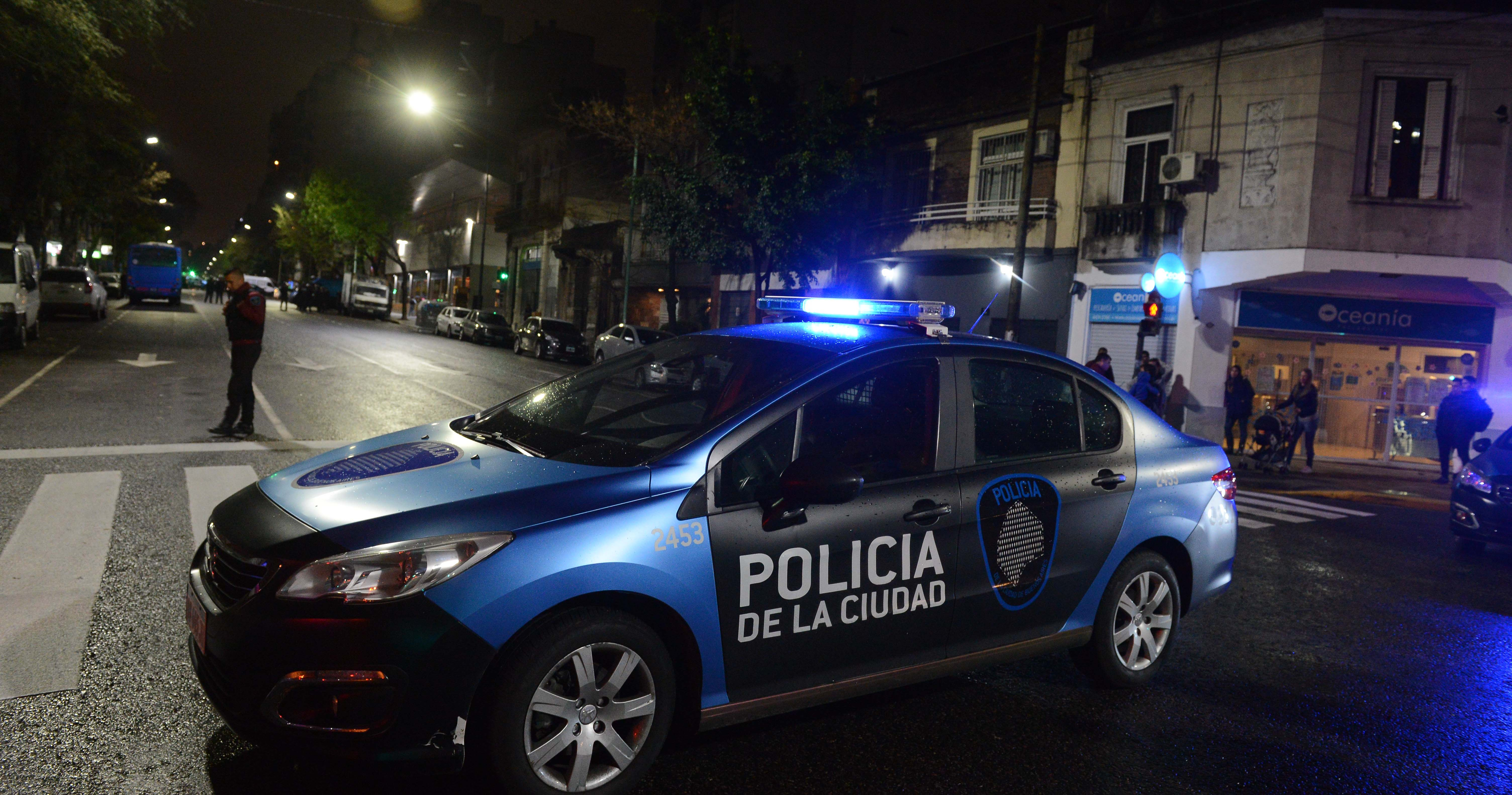 Patrullero Citroën de la Policía de la Ciudad de Buenos Aires.